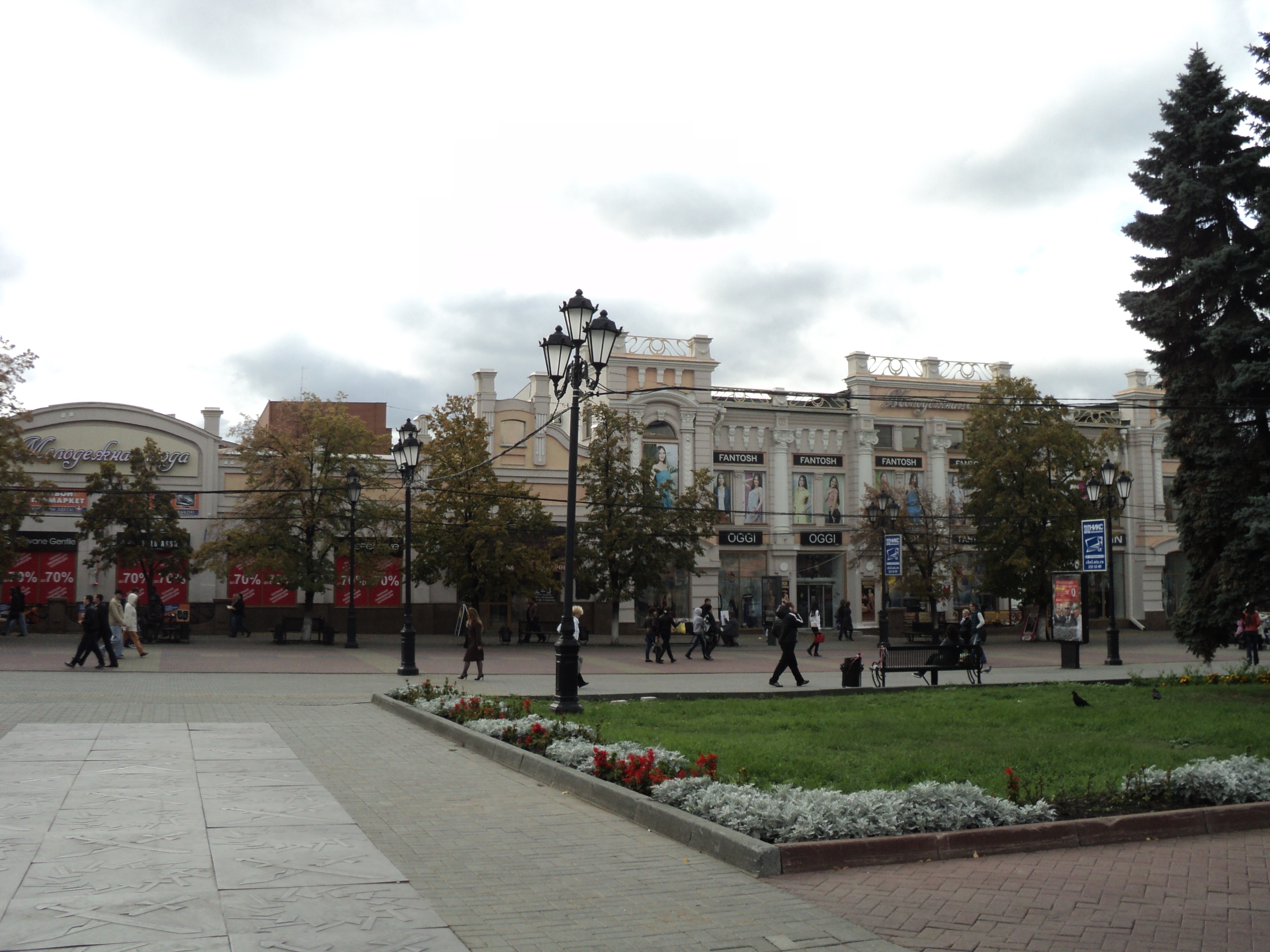 Торговый дом купца М. Ф. Валеева (сегодня – Торговый дом «Молодежная мода»)27 (14) октября 2011 года исполняется 100 лет со времени открытия в Челябинске магазина купца 1-й гильдии Мухамметхана Фазылхановича Валеева, крупного торгового дореволюционного заведения города. Мимо этого здания в центре Челябинска нельзя пройти равнодушно. Если попытаться описать его, получается почти человеческий портрет: красивое строго-элегантное, но не чопорное, оно всегда в приподнятом настроении, даже в непогоду и при любых обстоятельствах.